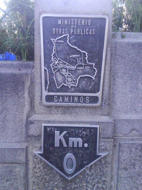 Kilometro Cero. Bolivia. Ciudad de La Paz, Sede de Gobierno. De acuerdo al DECRETO SUPREMO Nº 06283 de 23 de Noviembre de 1962 durante el Gobierno Constitucional del Dr. Victor Paz Estenssoro. Se dispuso que se debia fíjar el “KILOMETRO CERO NACIONAL” en la Plaza Murillo de la ciudad de La Paz, debiendo colocarse un hito en el lugar que determine el Consejo Nacional de Caminos. Fotografía tomada por José Luis Claros López. 16 de Julio 2010.